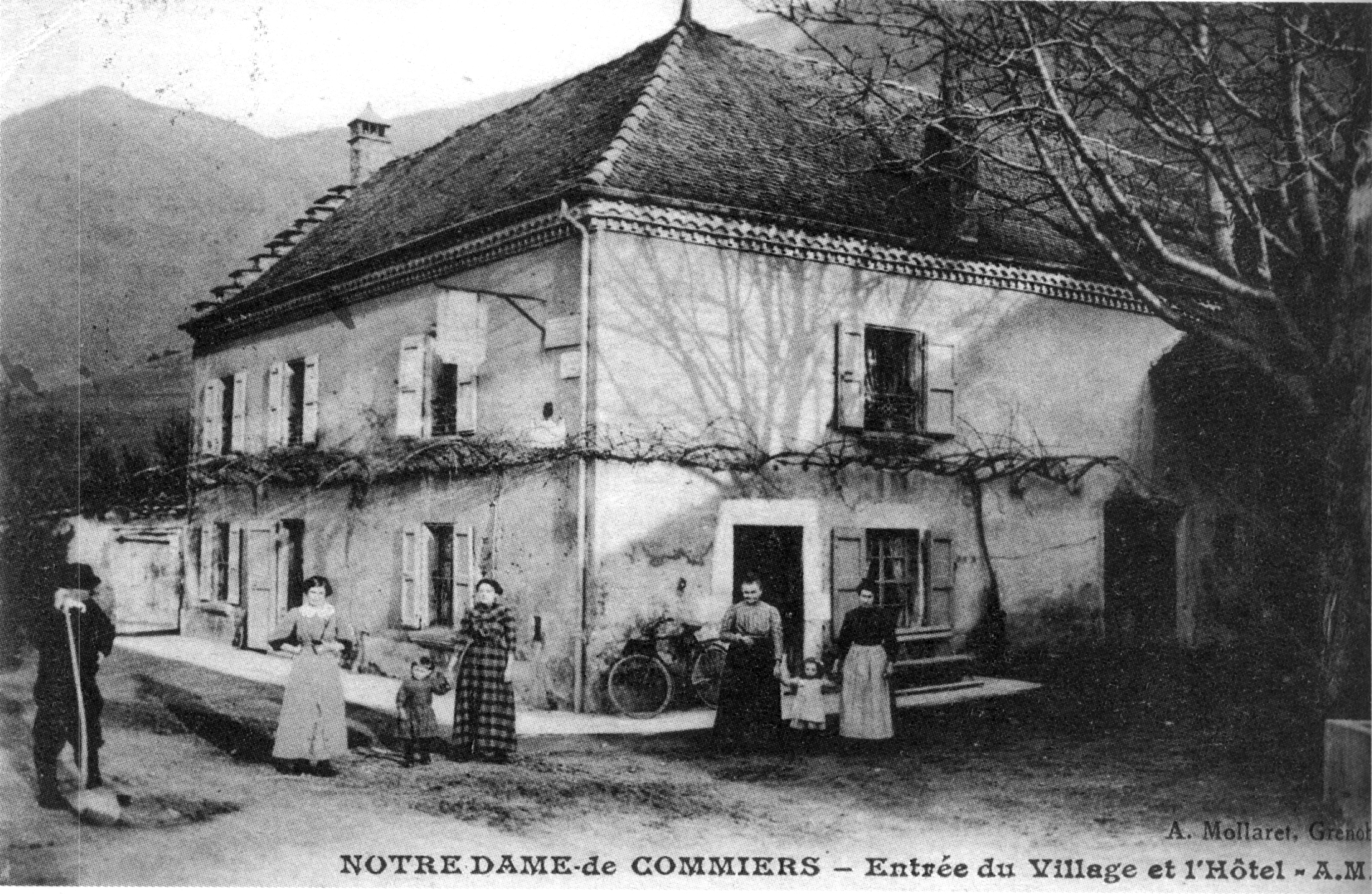 Notre-Dame-de-Commiers, entrée du village et l'hotel en 1908